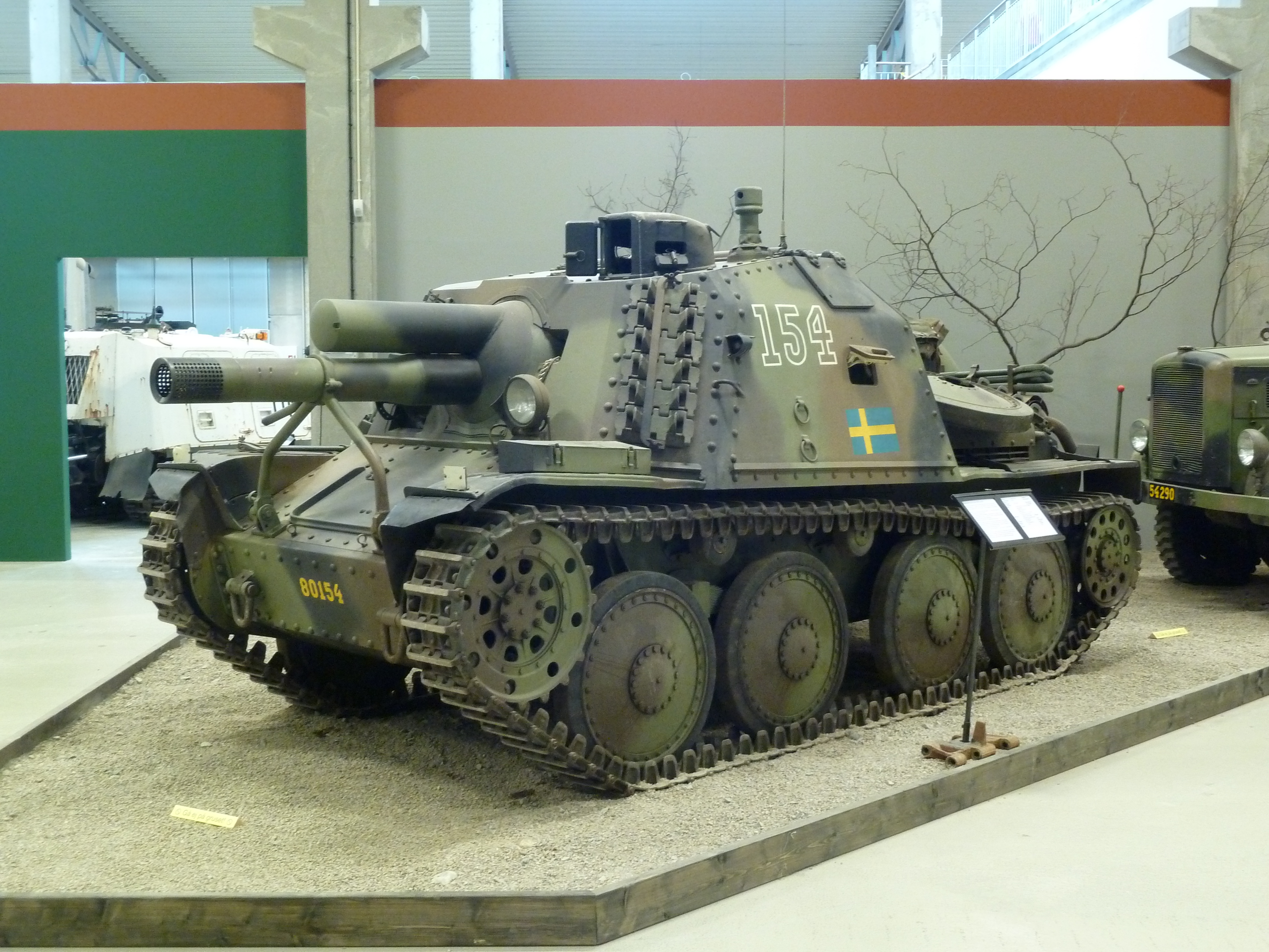 Stormartillerivagn m43 finns det i Arsenalen (Sveriges Försvarsfordonsmuseum - Strängnäs) 12.08.2011